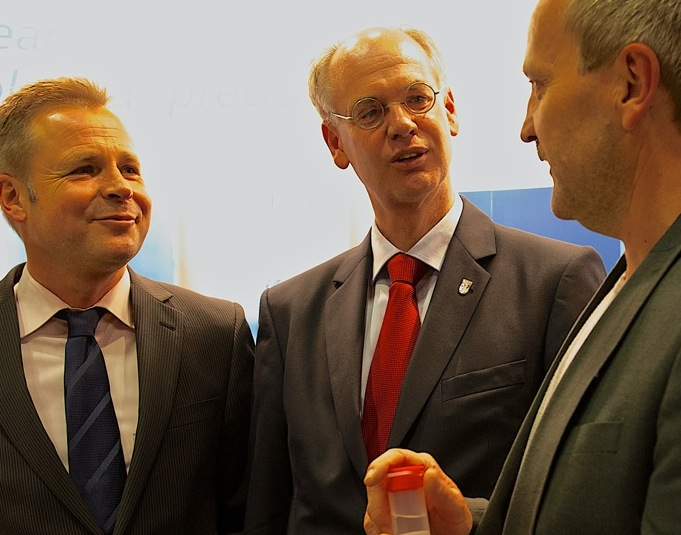 Pankows Bezirksbürgermeister Matthias Köhne auf dem 19. Pankower Wirtschaftstag, 24.10.2013 (v.l.n.r: Dr. Ulrich Scheller, Geschäftsführer der BBB Management GmbH, Bezirksbürgermeister Matthias Köhne, Dr. Uwe Möller, Geschäftsführer der EMP Biotech GmbH)